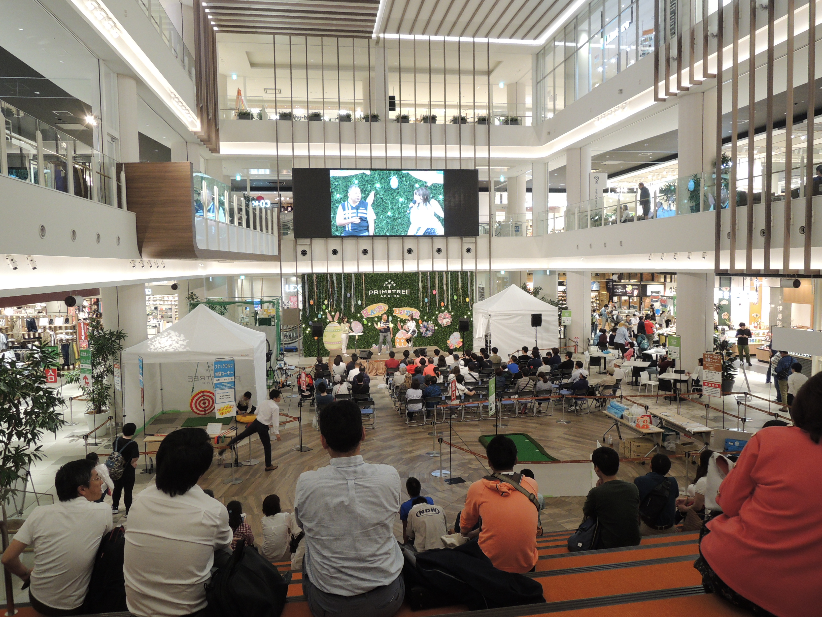 プライムツリー赤池1階・プライムホール。 吹き抜け構造になっている。 Nikon Coolpix P310